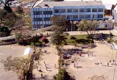 Escola Santa Catarina